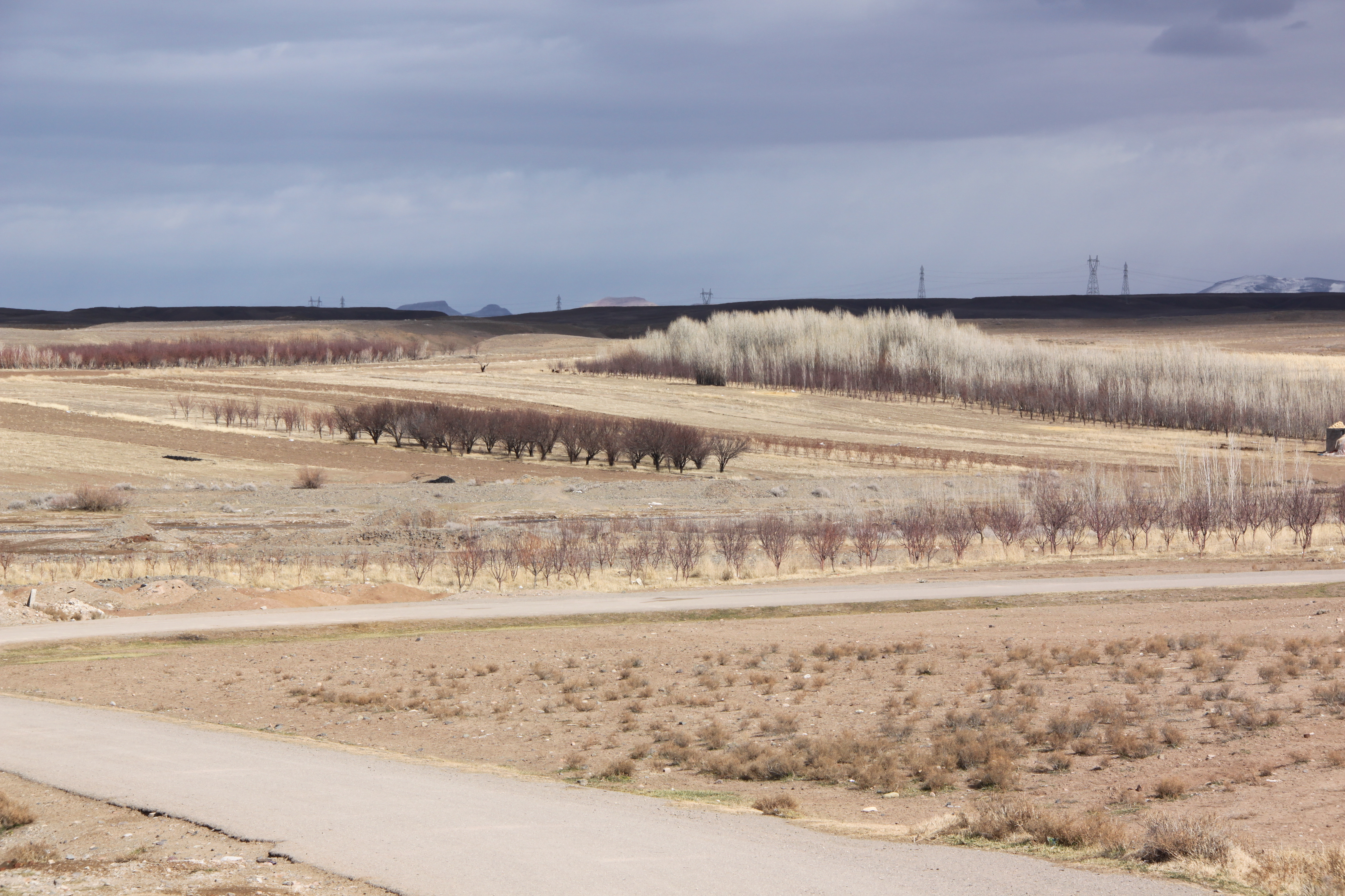 کاروان‌سرای نیک پی